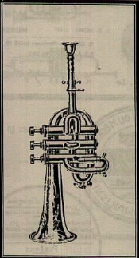 Trombino